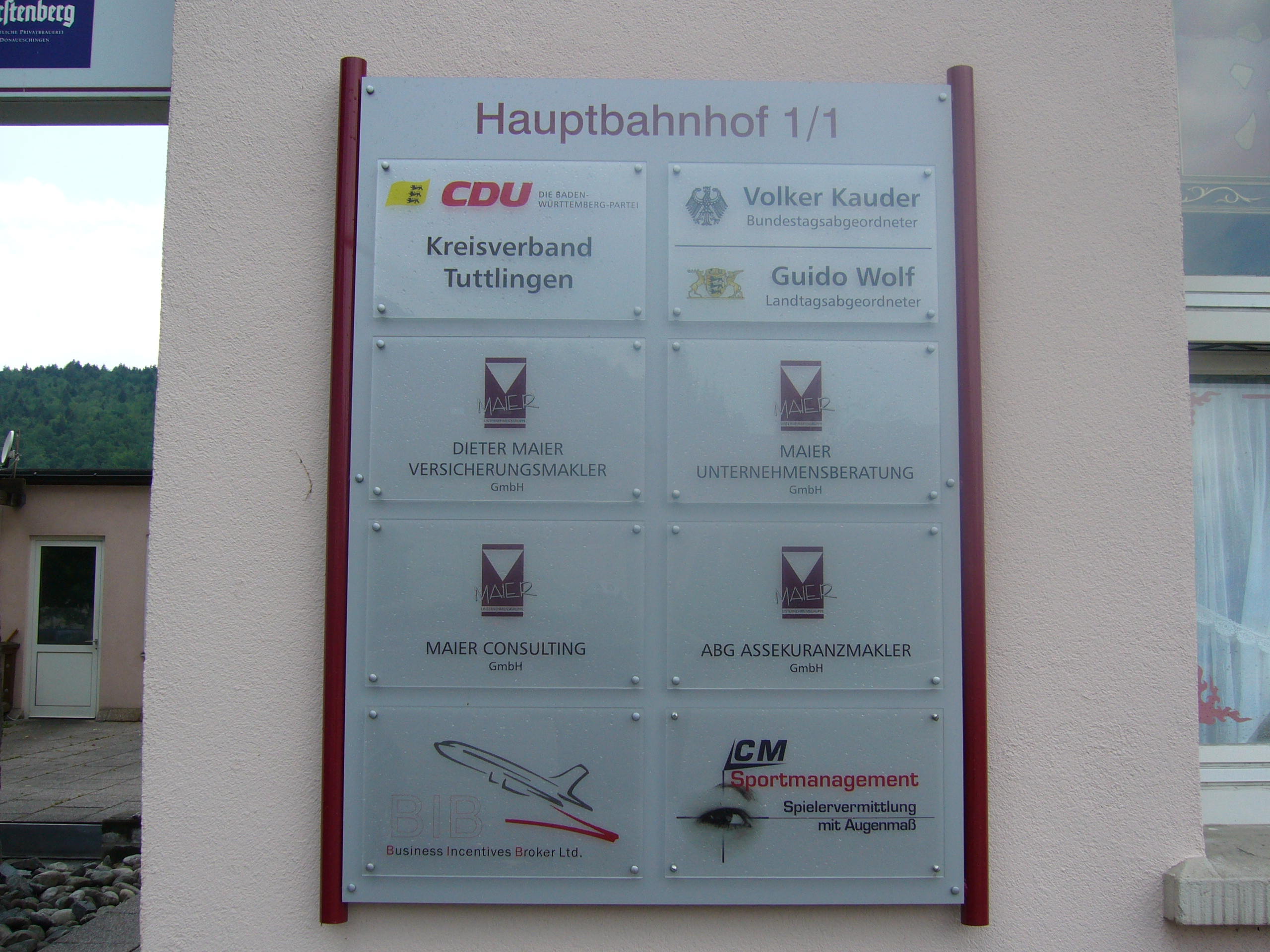 Firmenschild, das auf das Wahlkreisbüro von Volker Kauder und Guido Wolf hinweist, fotografiert am Westflügel des Empfangsgebäudes des Bahnhof Tuttlingen. Baden-Württemberg, Deutschland.